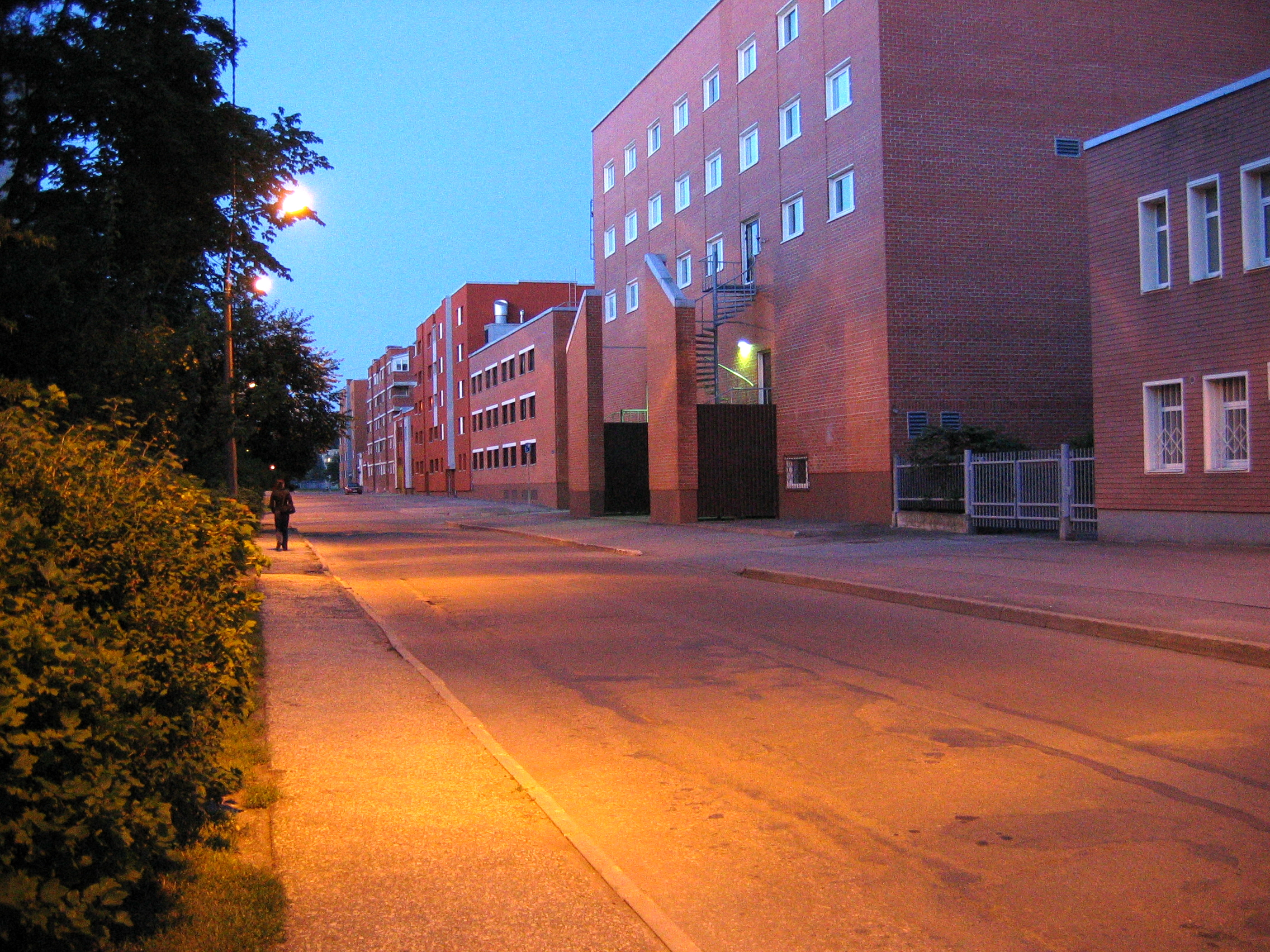 Tallinn Sommer 2007